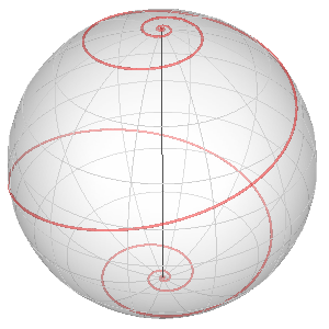 Loxodrome